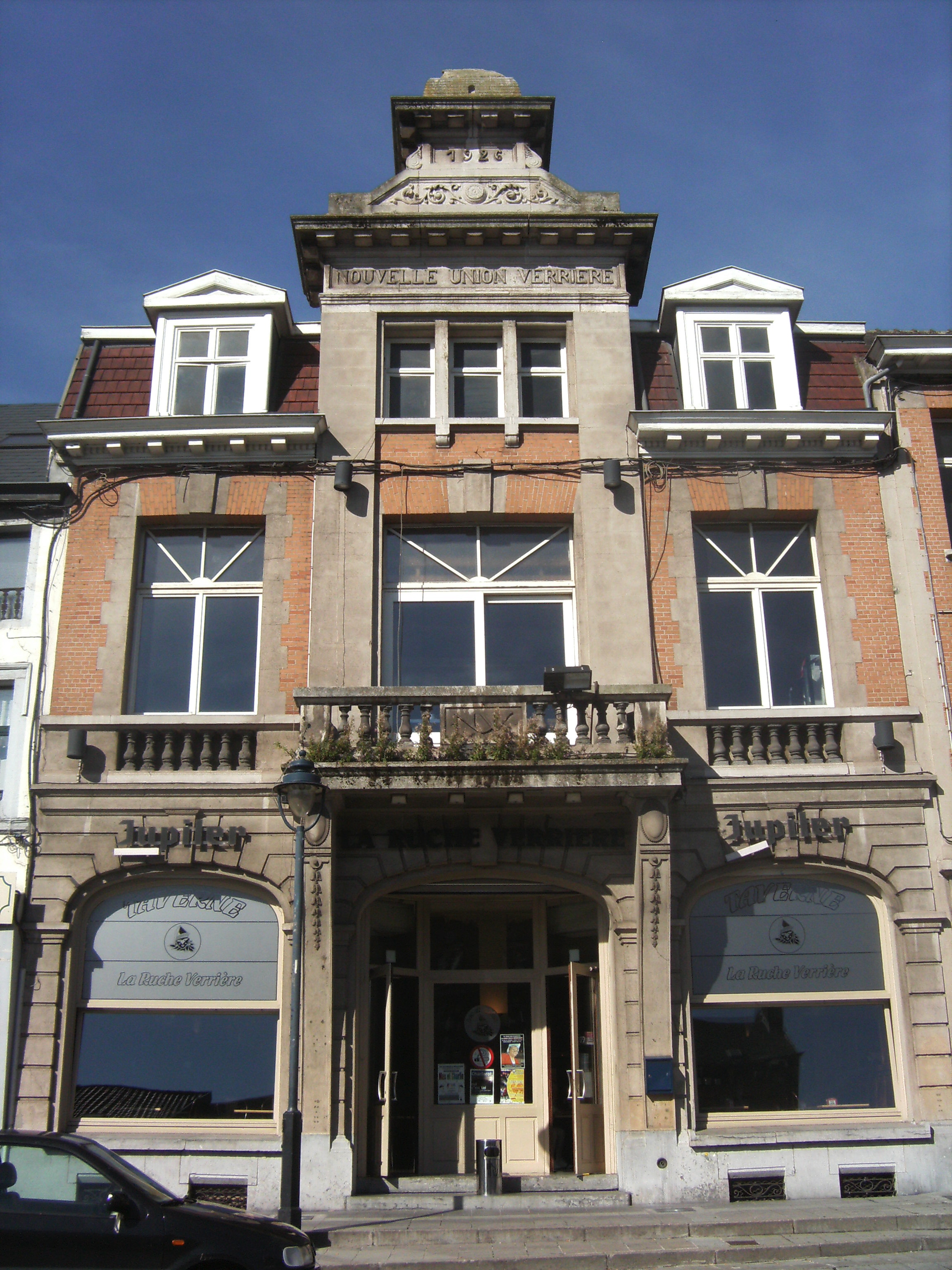 Lodelinsart (Charleroi-Belgique) - Place Edmond Gilles - La Ruche verrière - 1926.